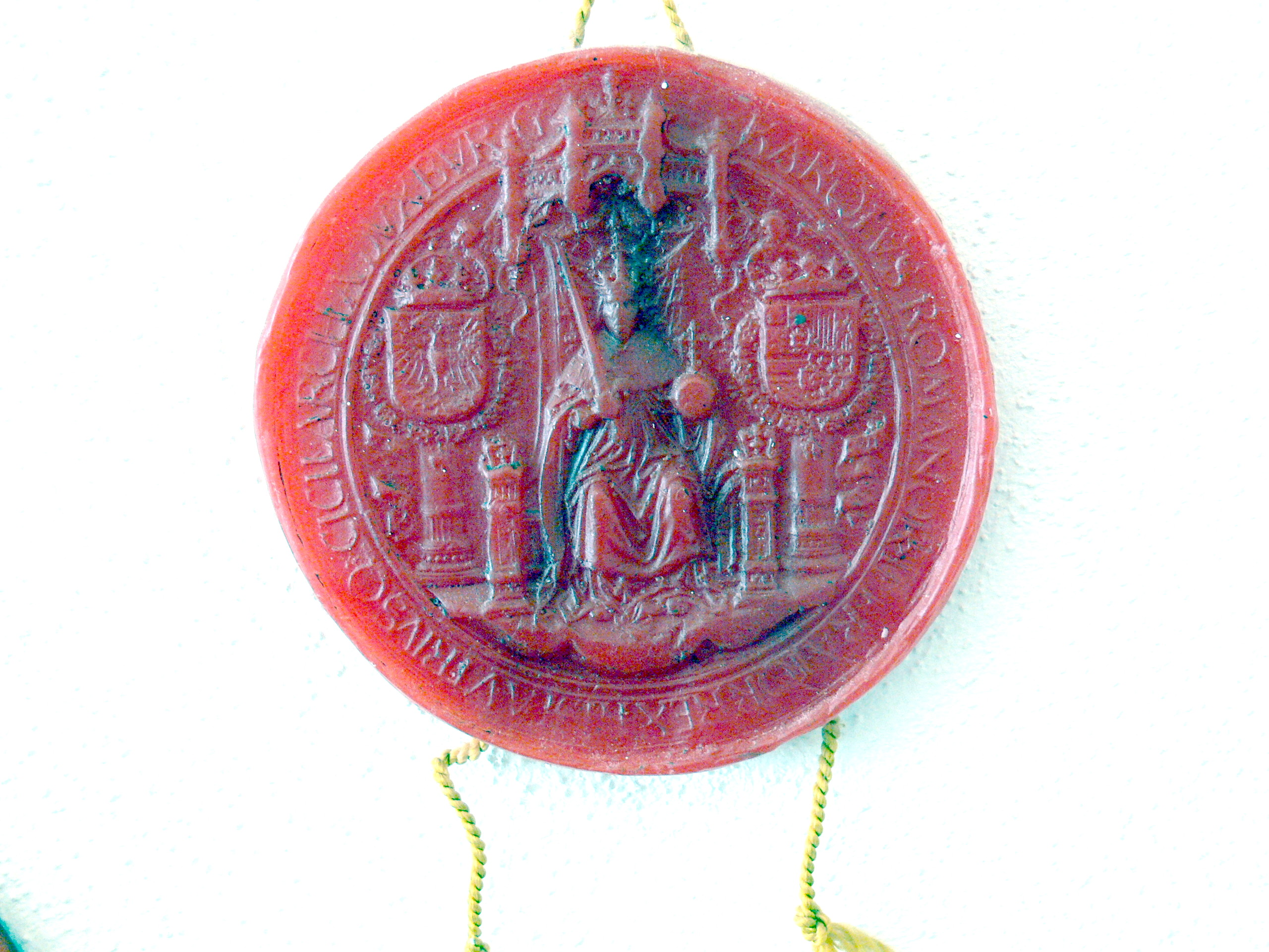 Siegel Kaiser Karl V. 1519. Kopie des 20. Jahrhunderts